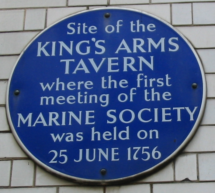 Nrf: Pliaque à Londres